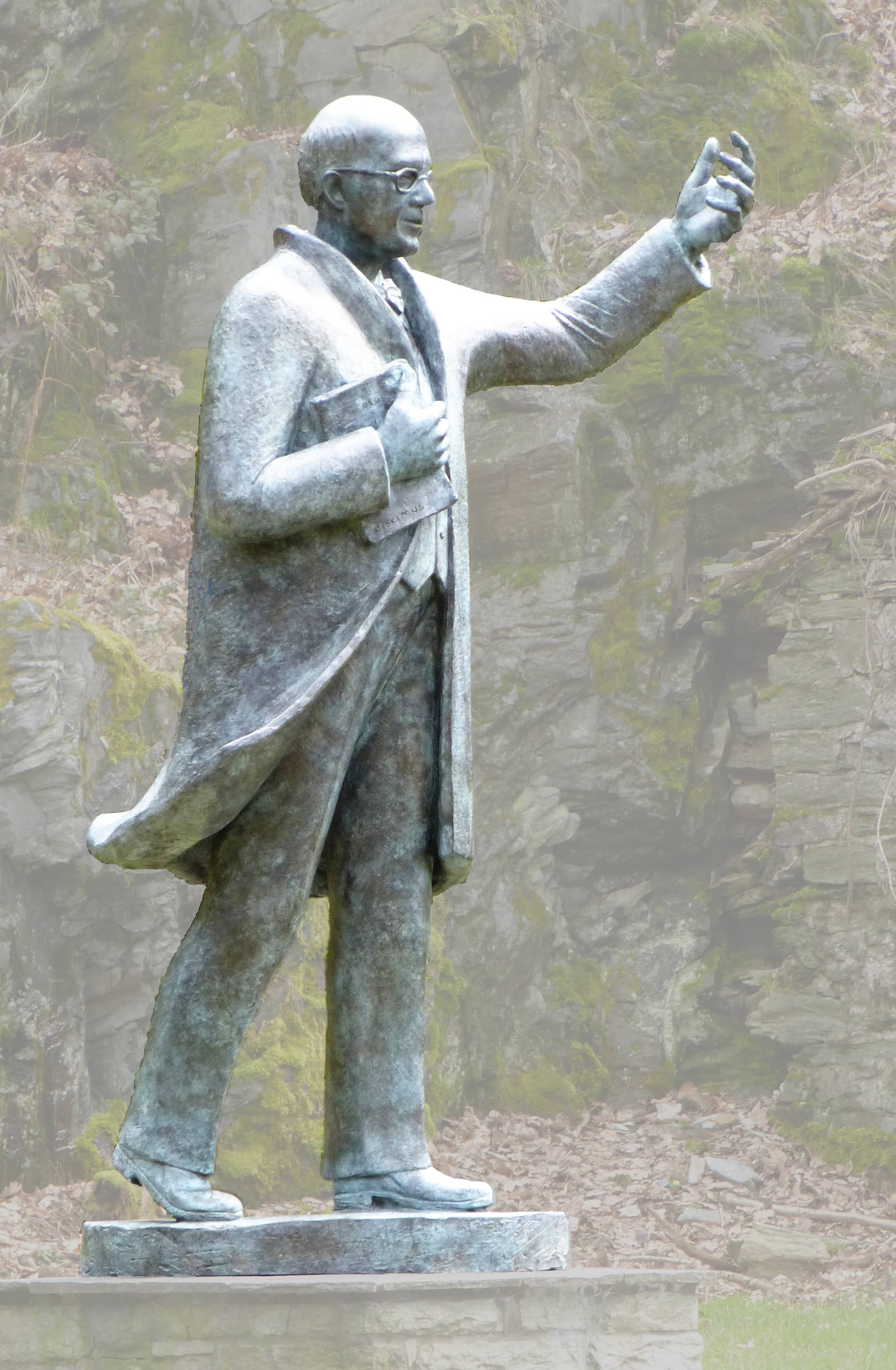 Denkmal des Gründers des Taunusschule Gymnasiums in Königstein/Ts. Direktor 1945-1957. Das Denkmal steht auf dem Grundstück des abgerissenen "Alten Schülchens" am Klärchenweg in Königstein.